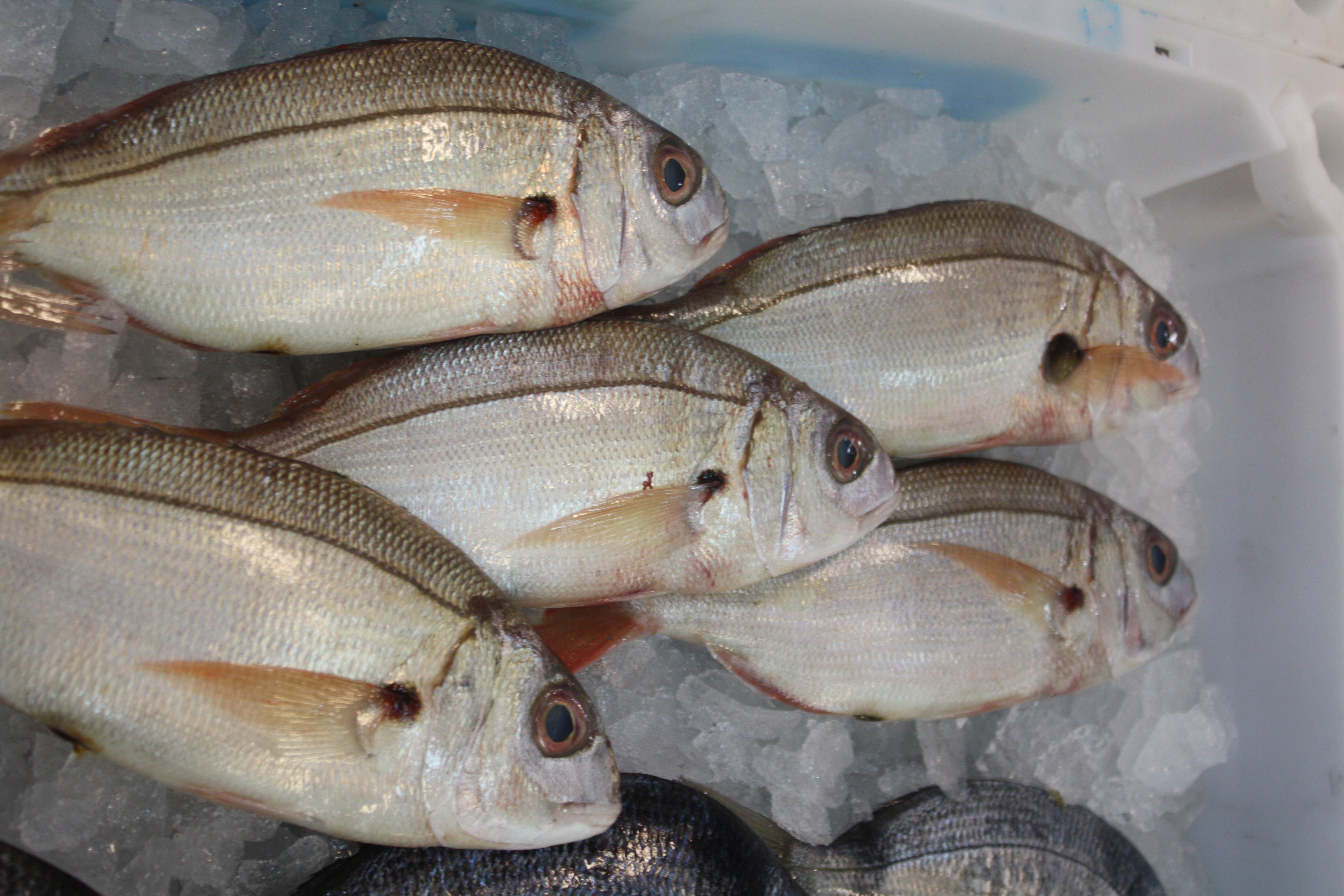 Ollomol (Pagellus bogaraveo), no mercado do Grove (Pontevedra)